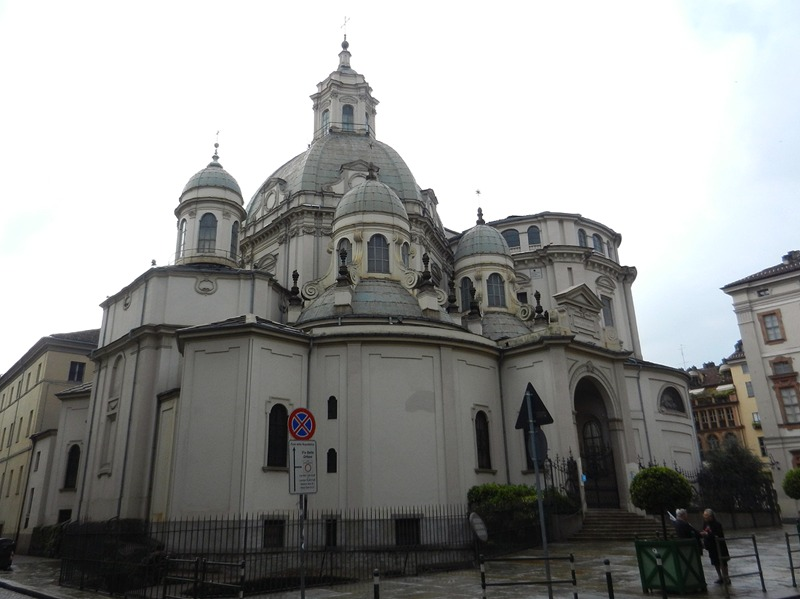 Torino - Santuario della Consolata